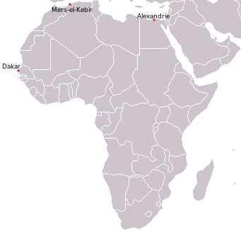 Naval bases where french ships were attacked during the Catapult operation Bases navales où les navires français ont été attaqué lors de l'opération Catapult